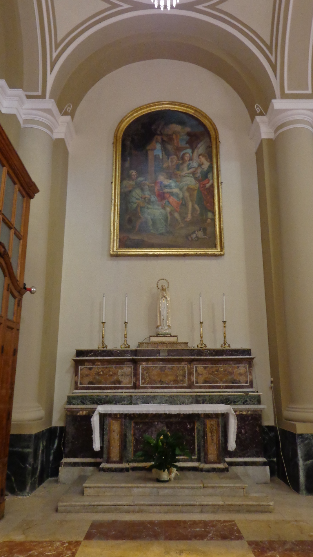 Altare della Madonna della Mercede, Pietro Paolo Vasta, attribuzione: Canonico Tobiolo e Arcangelo Raffaele